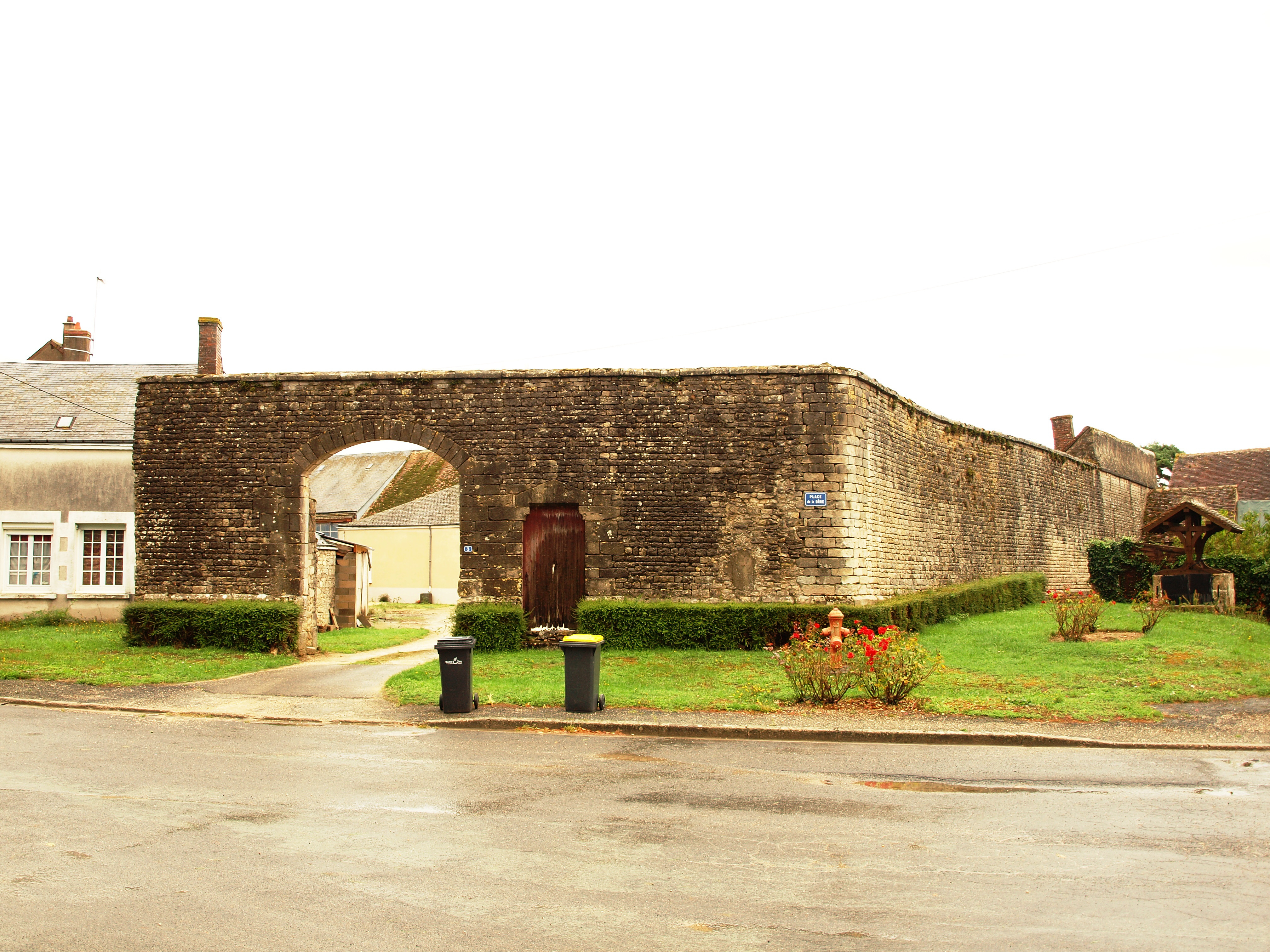 La Colombe (Loir-et-Cher) , hameau de la Gahandière